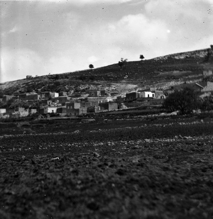 הכפר דבוריה לרגלי הר תבור 1928 - /ד"ר אלקן